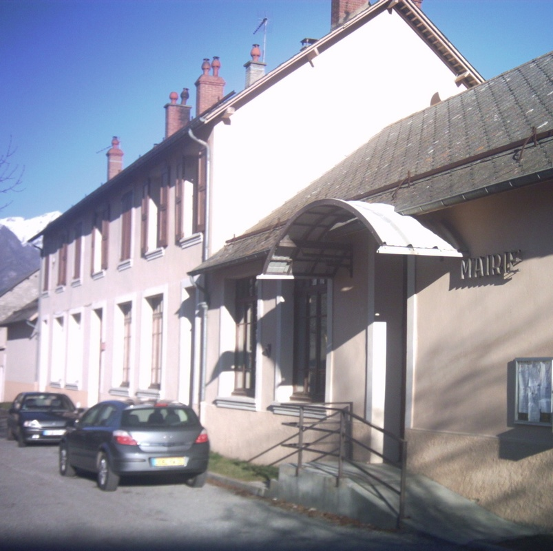 La mairie et l'école de Poligny (Hautes-Alpes).